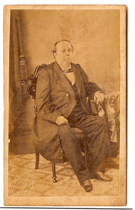 Antonio Alves da Silva, barão de Amaragi.